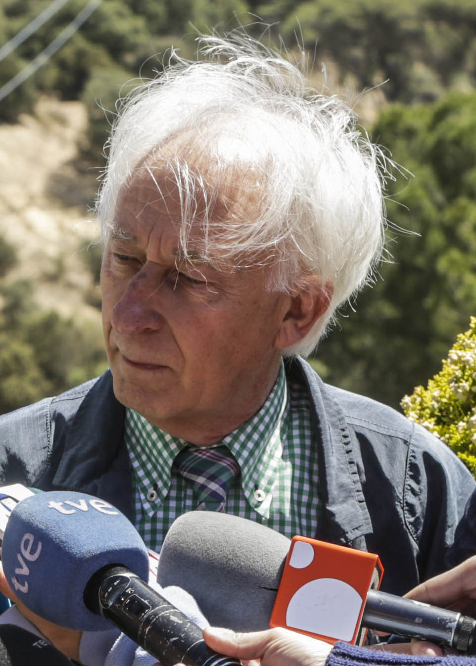 Fotos Teleférico